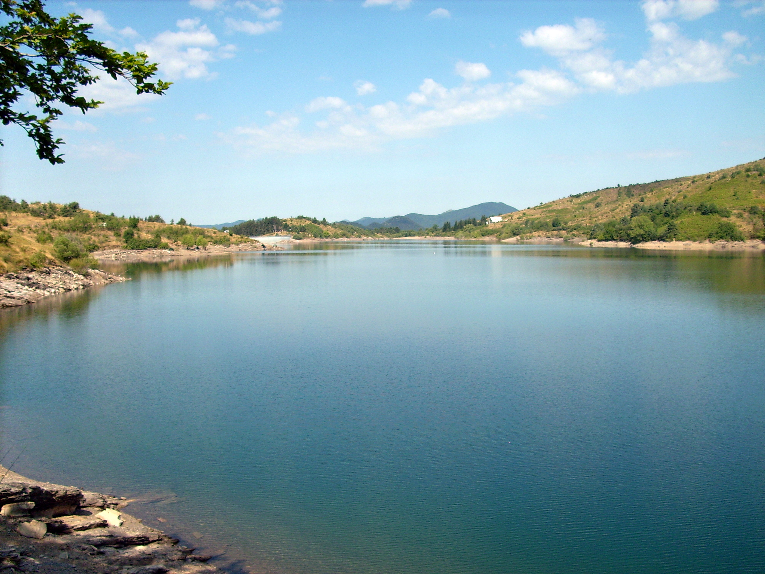 Lago artificiale di Giacopiane presso Borzonasca, Liguria, Italia